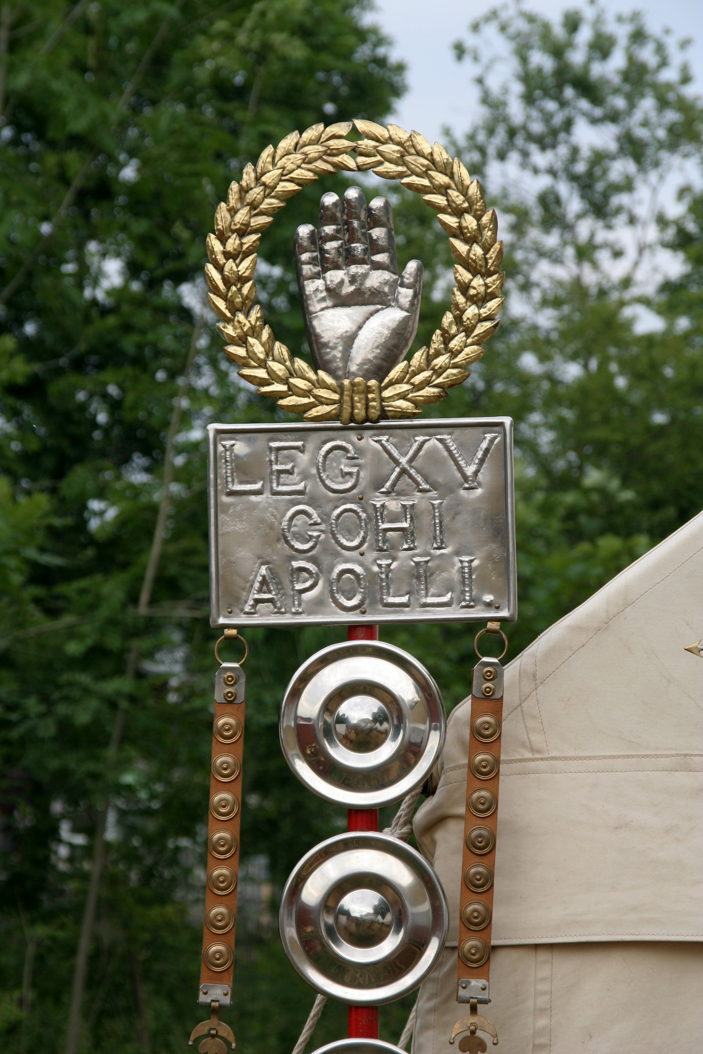 Signum romanum.